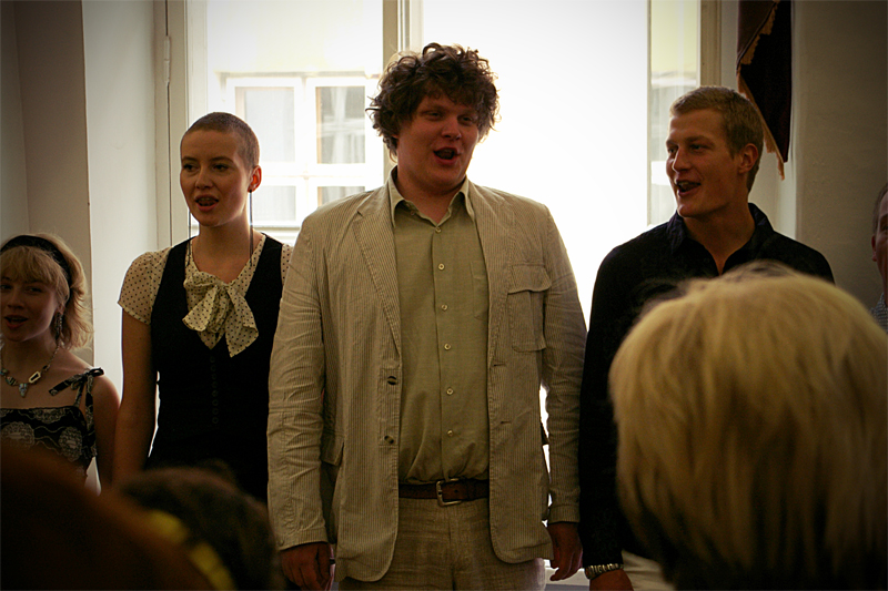 Uku Uusberg keskel